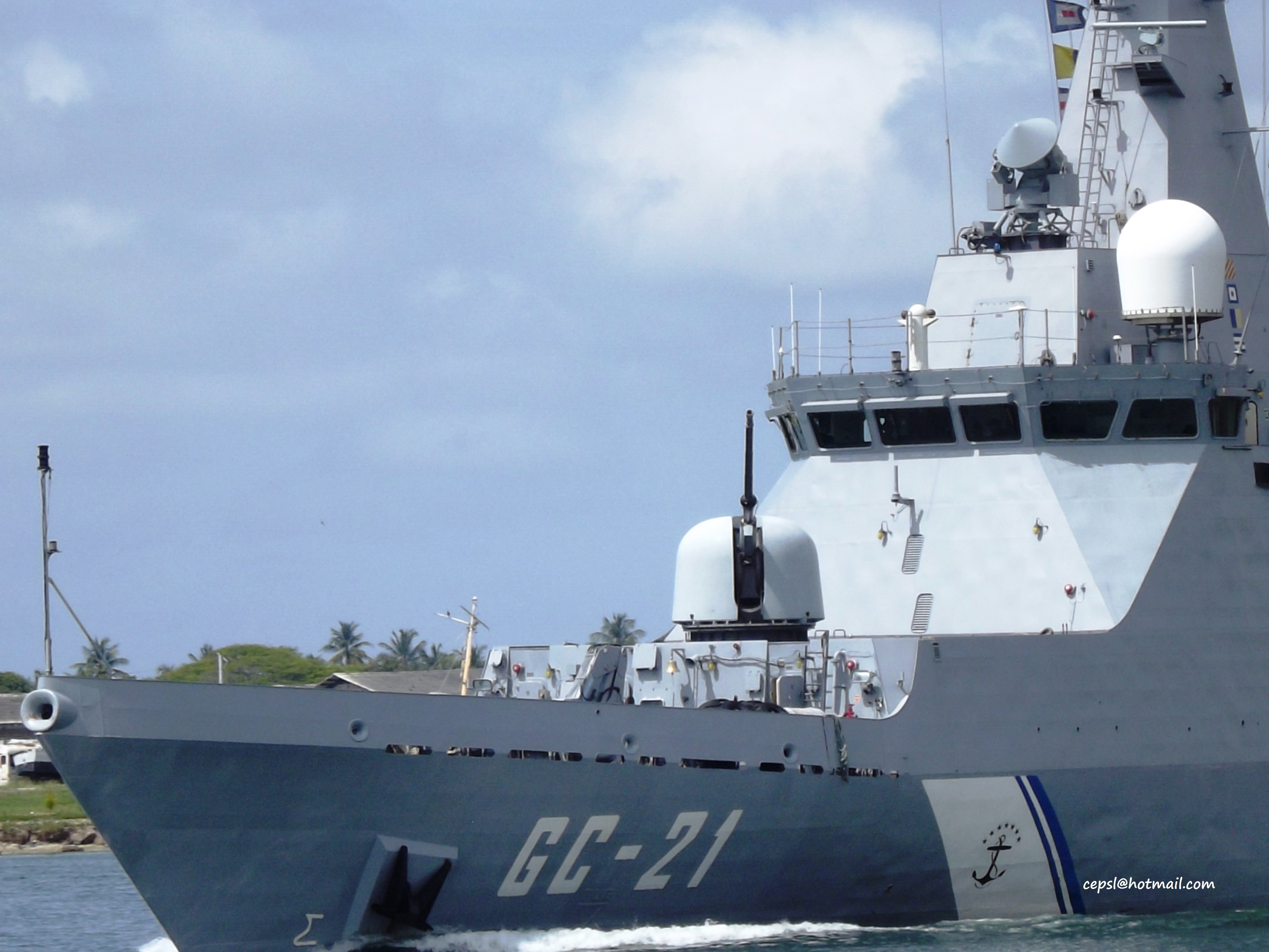 GC-21 Guaicamacuto - Buque de patrullaje oceánico (OPV) Clase BVL Guaicamacuto, Julio 2012 Día de la Armada Nacional de Venezuela